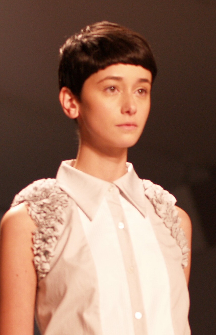 Model Cecilia Méndez